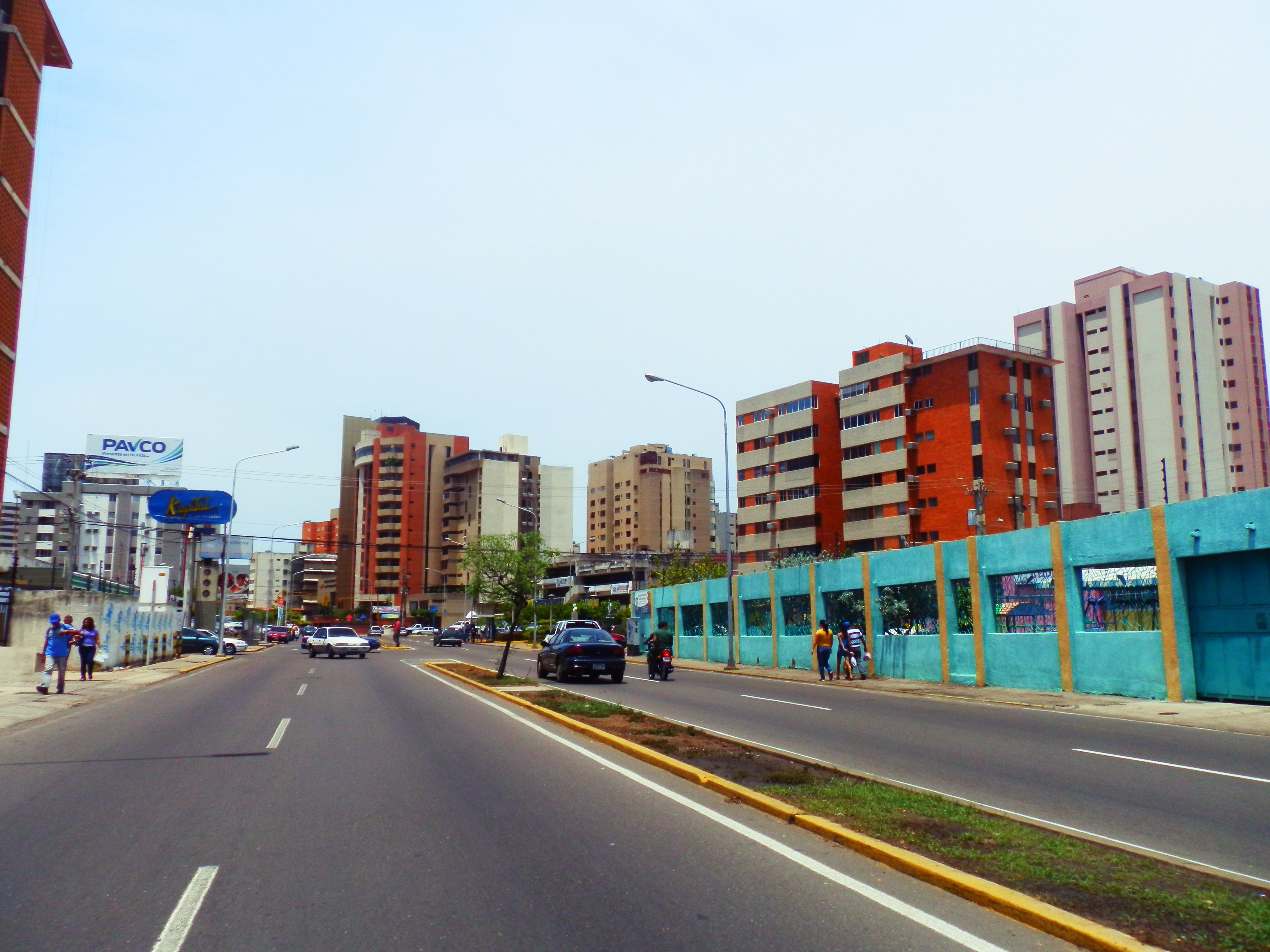 Edificios en Maracaibo, arquitectura marabina